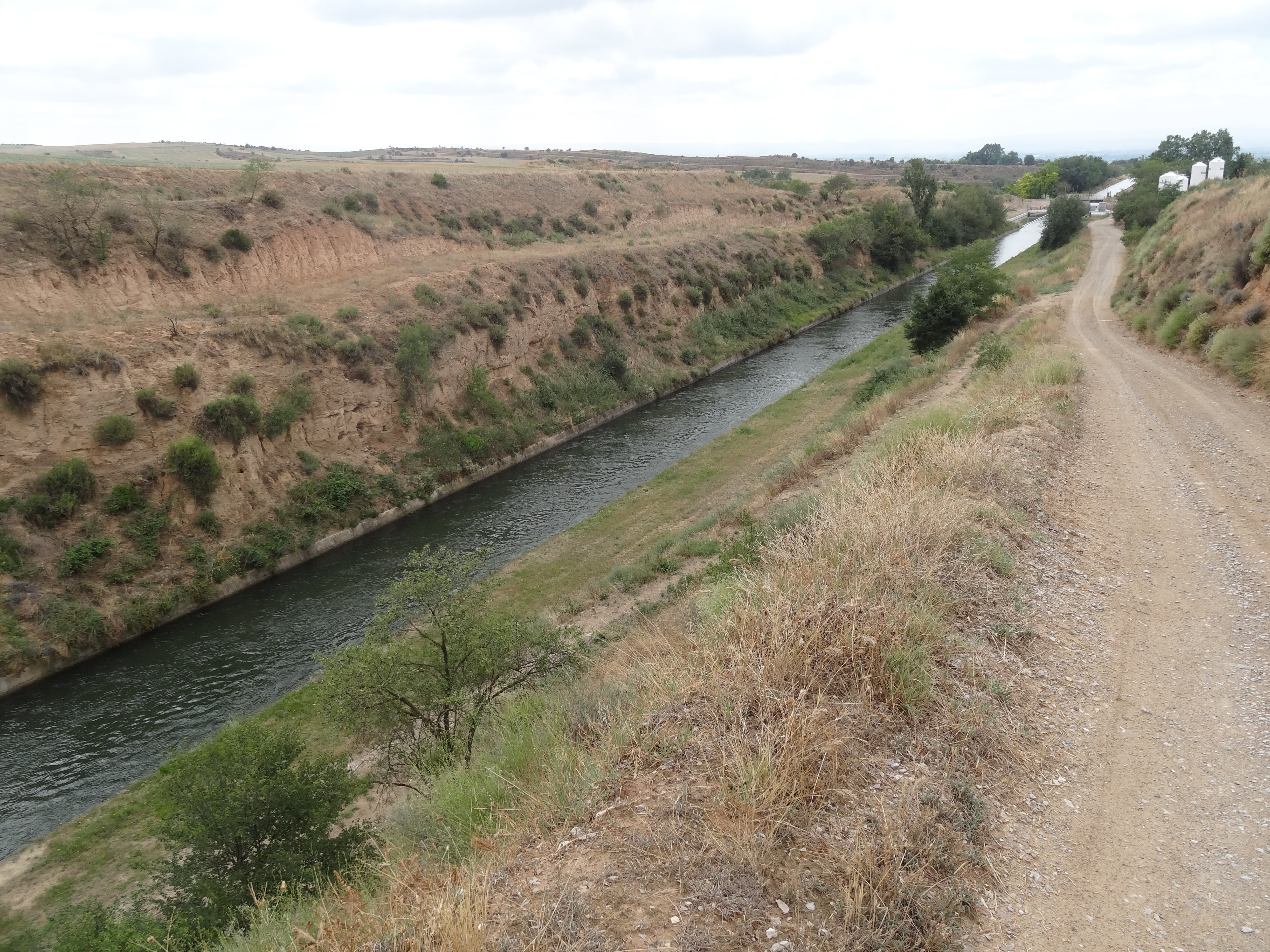 Canal d'Urgell sortint de la trinxera de la Serra d'Almenara - Caseta del Canal al fons (termes d'Agramunt i Castellserà)